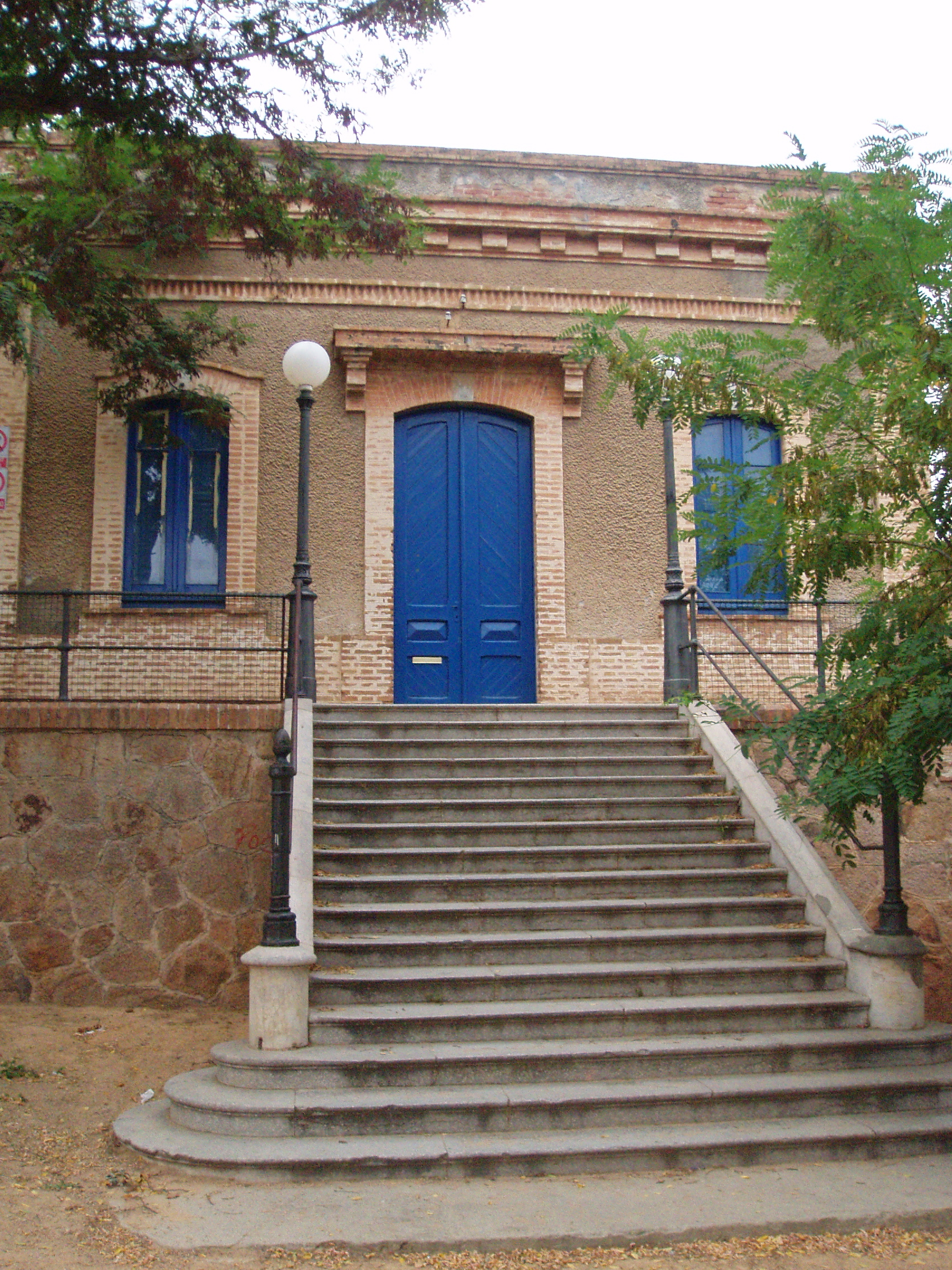 Sant Feliu de Guíxols' old railroad station